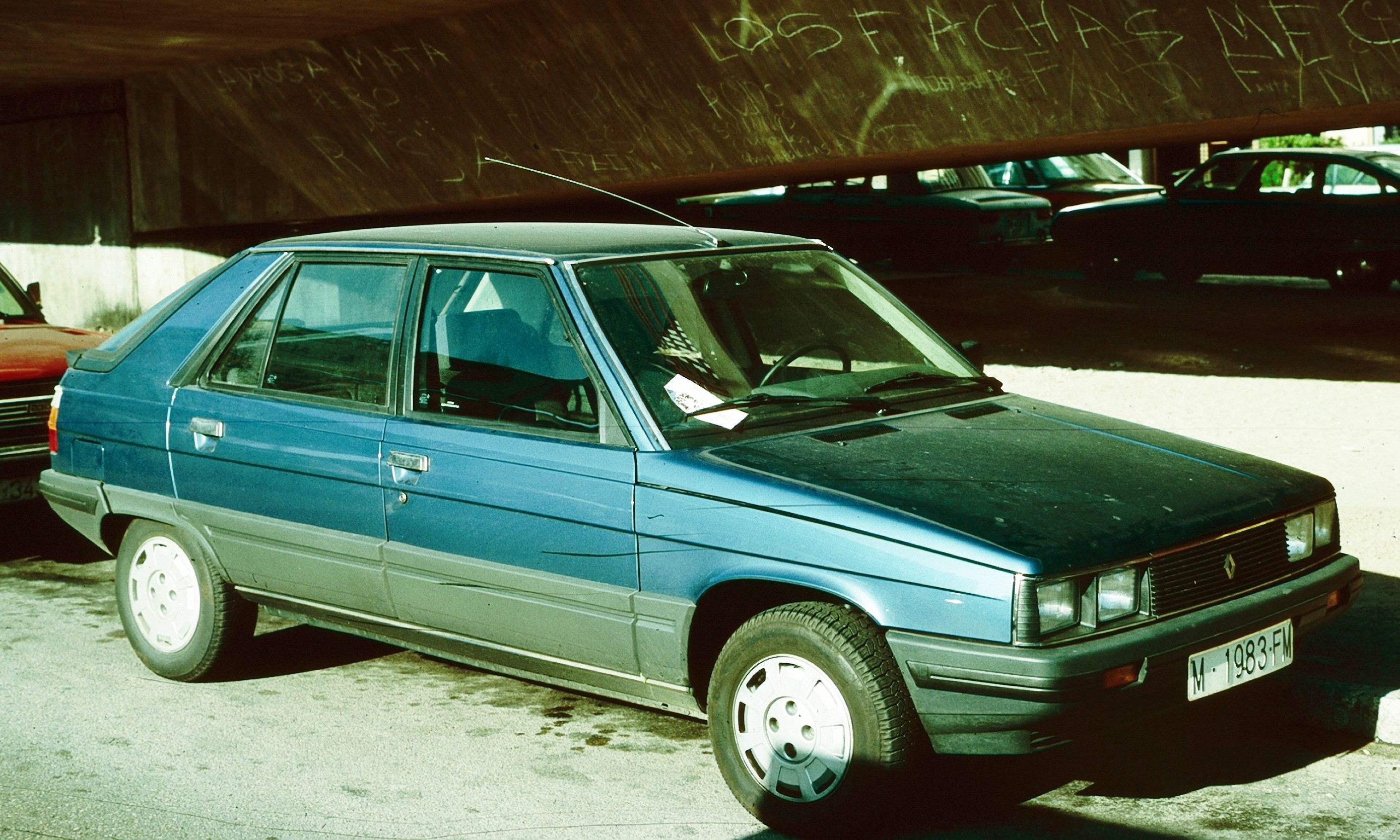 Renault 11